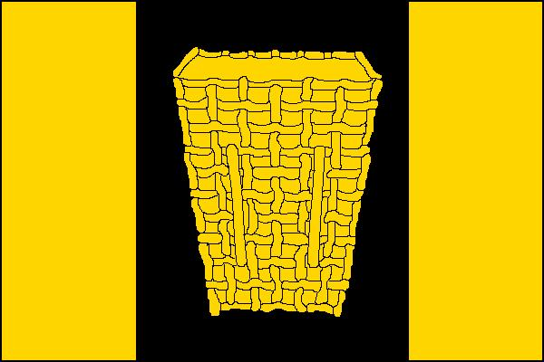 Vlajka obce Nošovice